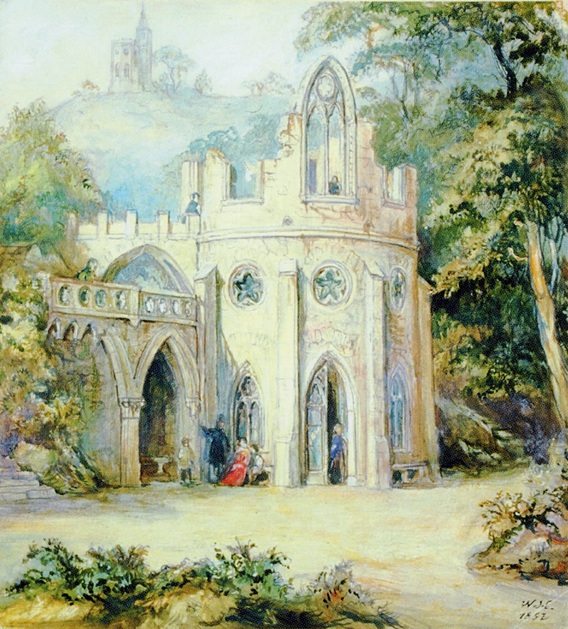 Radebeul-Oberlößnitz, Künstliche Ruine auf dem Jägerberg (Radebeul) von Woldemar Hermann